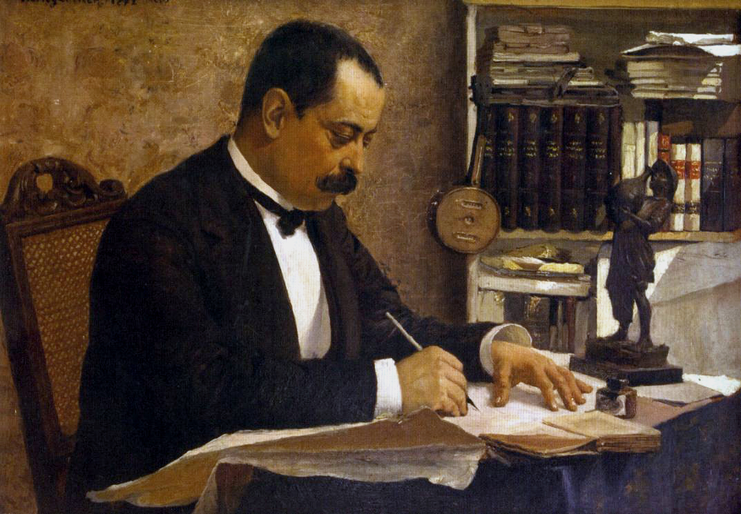 O notário, óleo sobre madeira, 19,8 x 28 cm